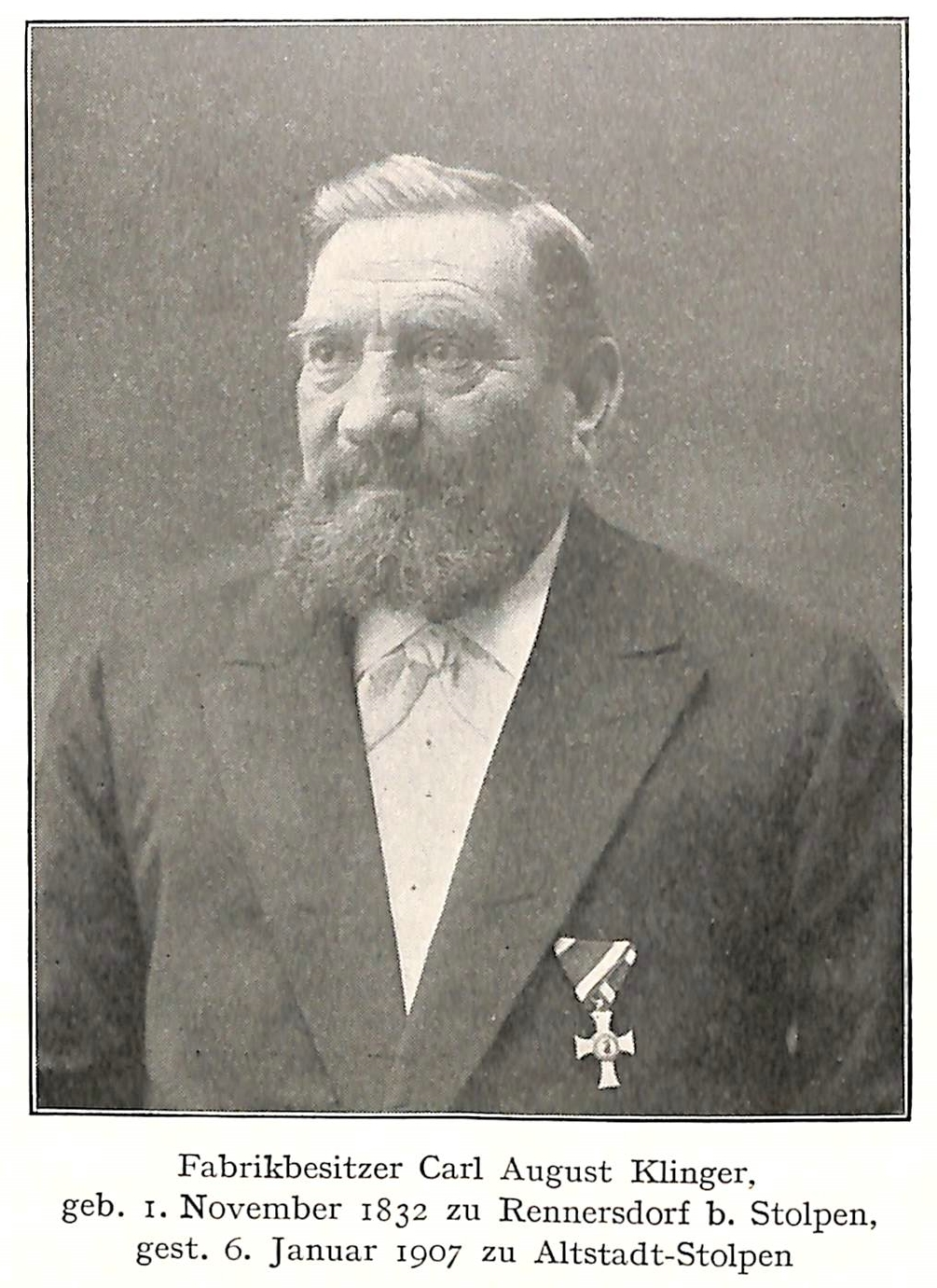 Portait des Carl August Klinger aus Altstadt-Stolpen.